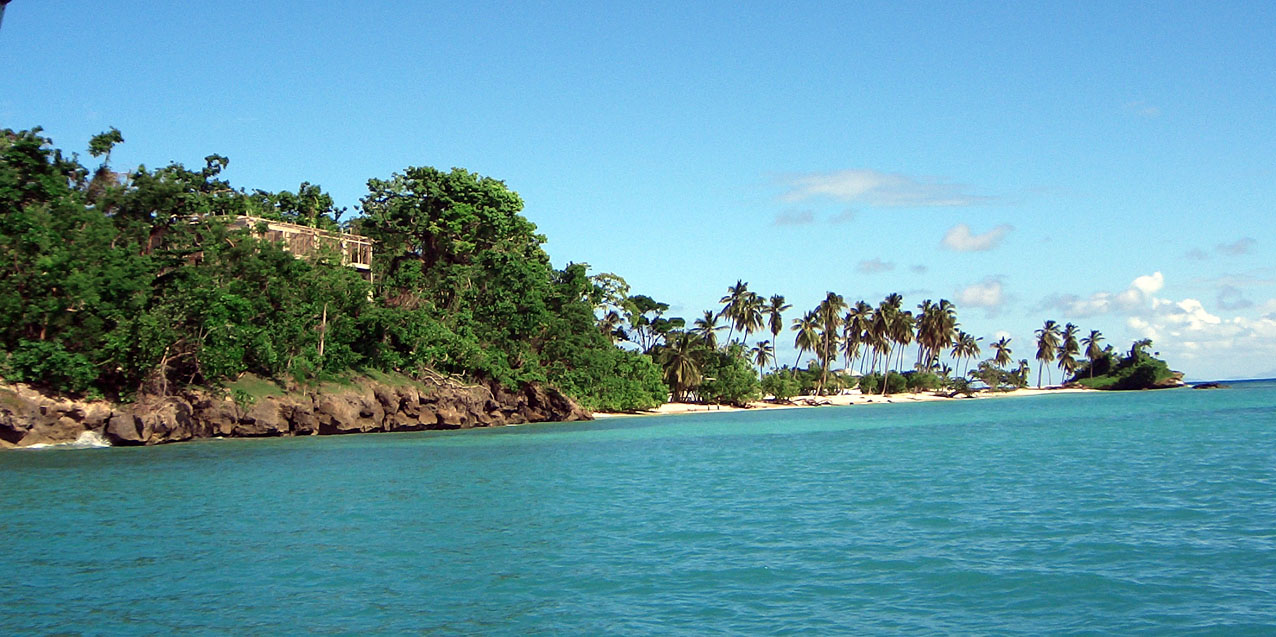 Dominikaniche Republik: Insel Cayo Levantado auf der angeblich ein Werbespot eines Rum Herstellers gedreht wurde